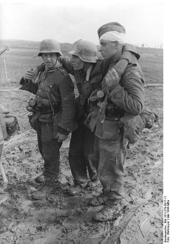 PK-Text: Kameraden: Der Kampf war hart. Die Sowjets ließen unzählige Tote und Verwundete auf dem Schlachtfeld zurück. Aber auch in unseren Reihen entstanden Lücken. Mit einem Oberschenkel-steckschuß der eine, der andere mit einem Kopfstreifschuß werden sie, sich gegenseitig Hilfe leistend, zum Truppenverbandsplatz gebracht. Raum Witebsk, Mitte Mai 1944, PK 697, Bildberichter: Wehmeyr ADN-ZB /Archiv II. Weltkrieg 1939 - 1945 An der Front in der Sowjetunion, im Kampfraum Witebsk, Mitte Mai 1944. In den schweren Abwehrkämpfen verwundete deutsche Soldaten, der eine mit einem Oberschenkelsteckschuß, der andere mit einem Kopfstreifschuß, werden zum Truppenverbandsplatz gebracht. 349-44 (Wehmeyr)